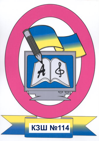 Офіційний логотип КЗШ№114